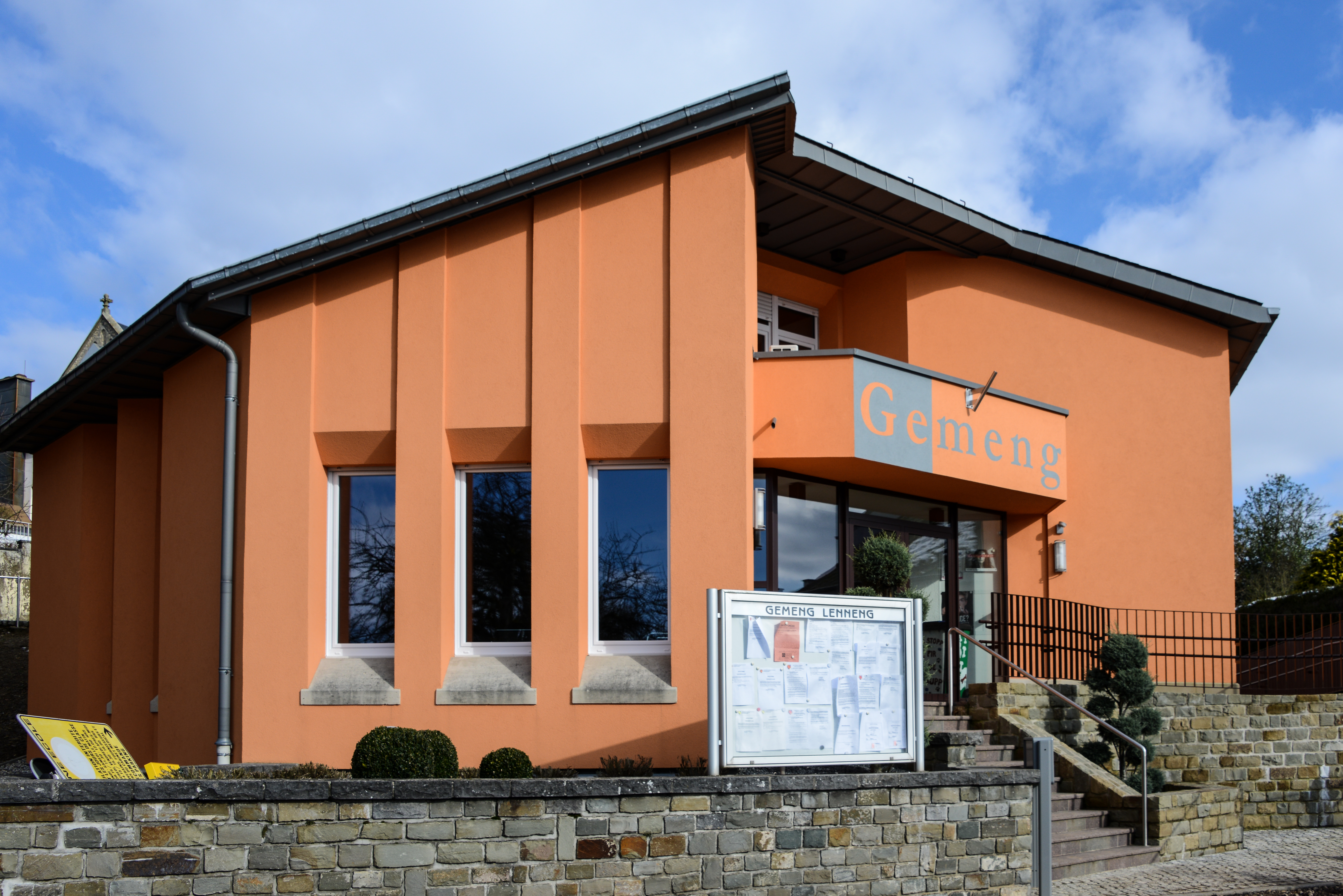 D'Lennenger Märei zu Kanech.